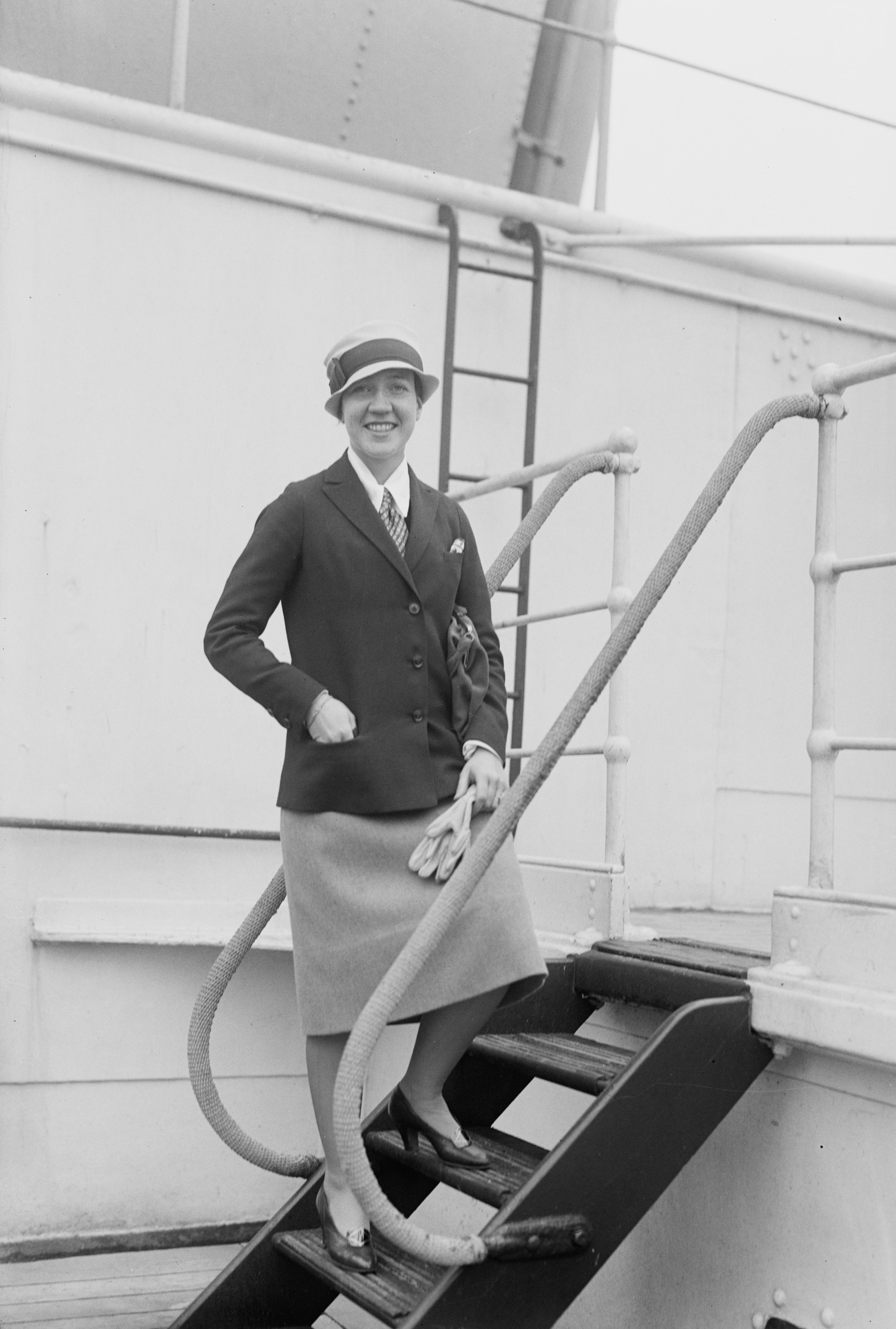 Natalie Hammond